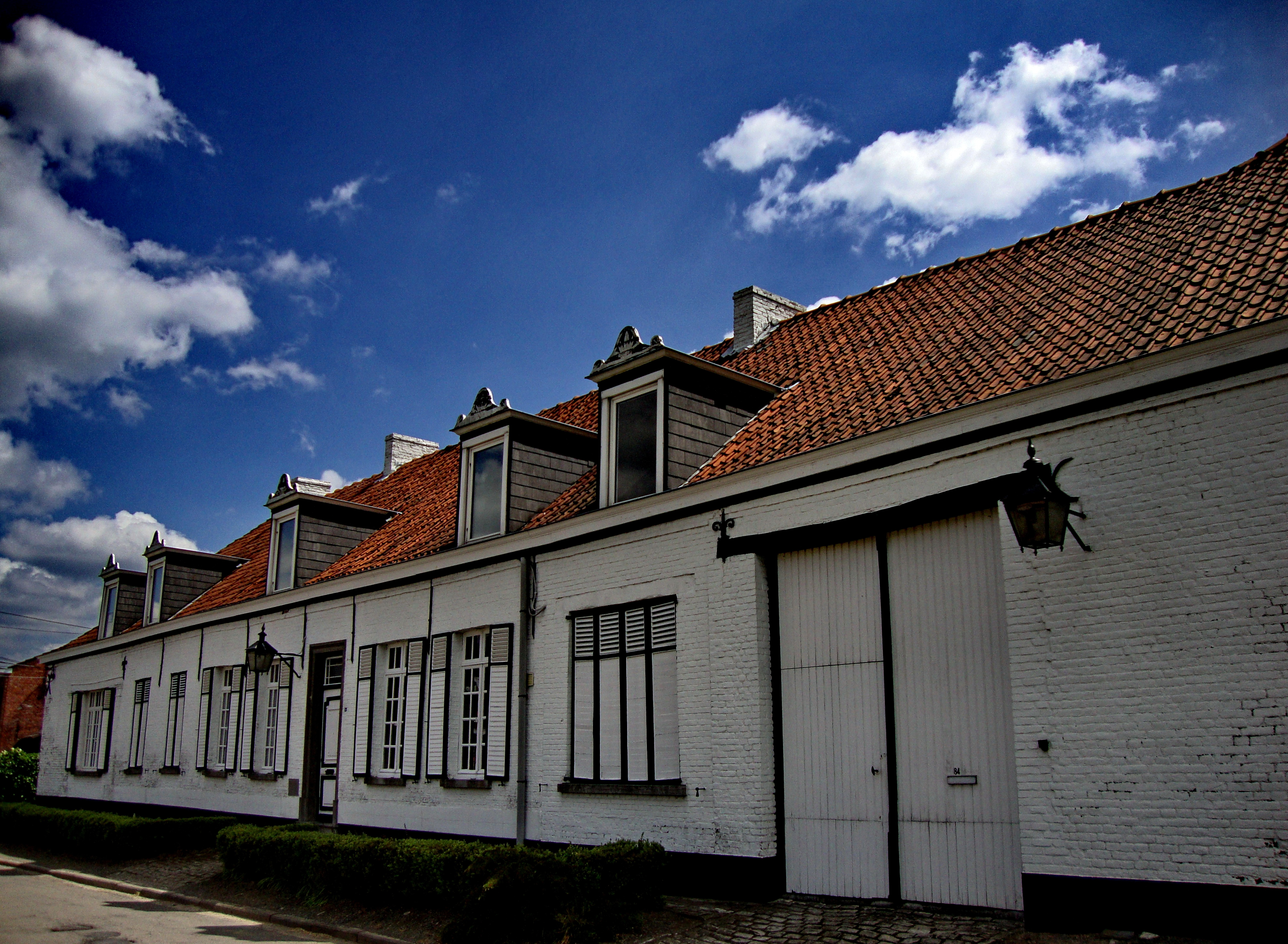 Prachtige herenhoeve te Wieze, gekend als 'Penkers Hof' ...